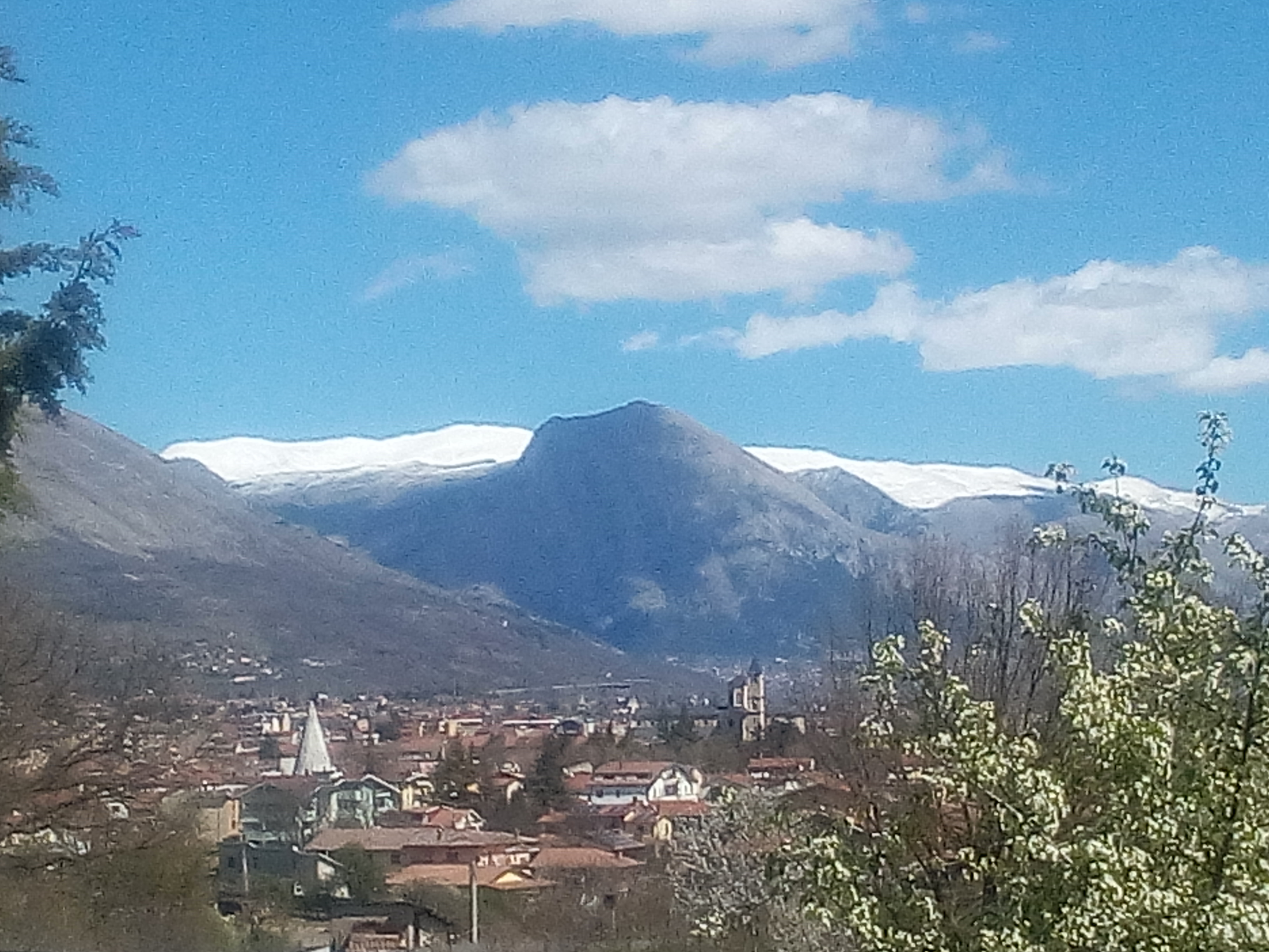 Monti della Magnola innevati visti da Avezzano